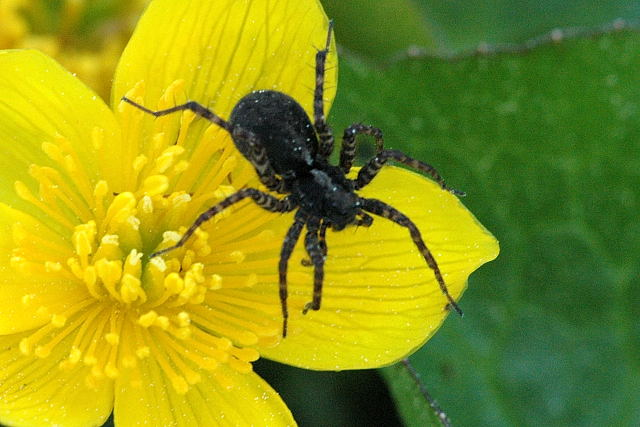 female Pardosa hortensis from Commanster, Belgian High Ardennes .